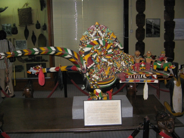 Holzskulptur der Iban, die einen Nashornvogel darstellt (iba: Kenyalang). Zu sehen im Sarawak Museum, Kuching, Malaysia.